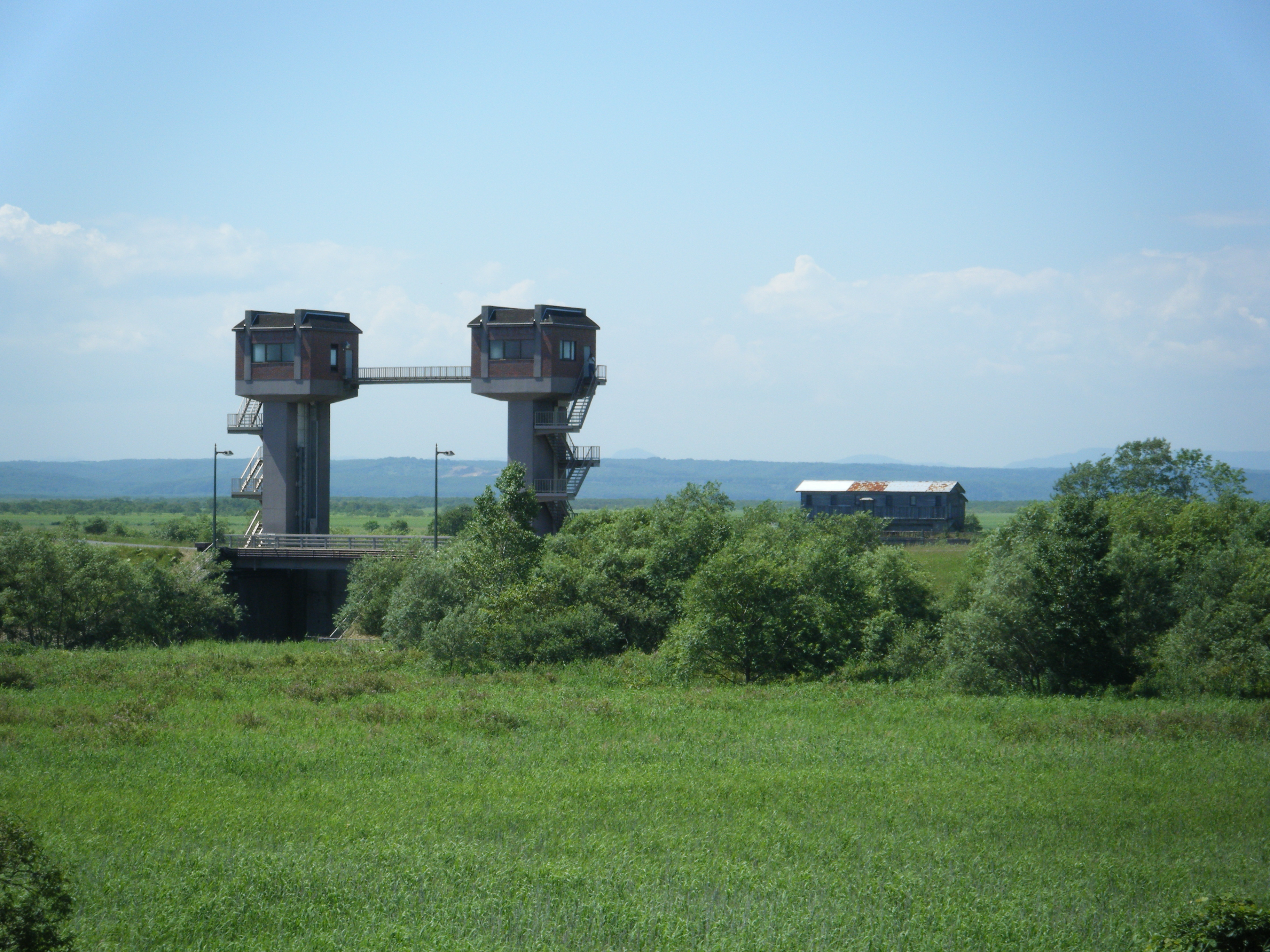 岩保木水門 JR北海道釧網線、くしろ湿原ノロッコ号車内より